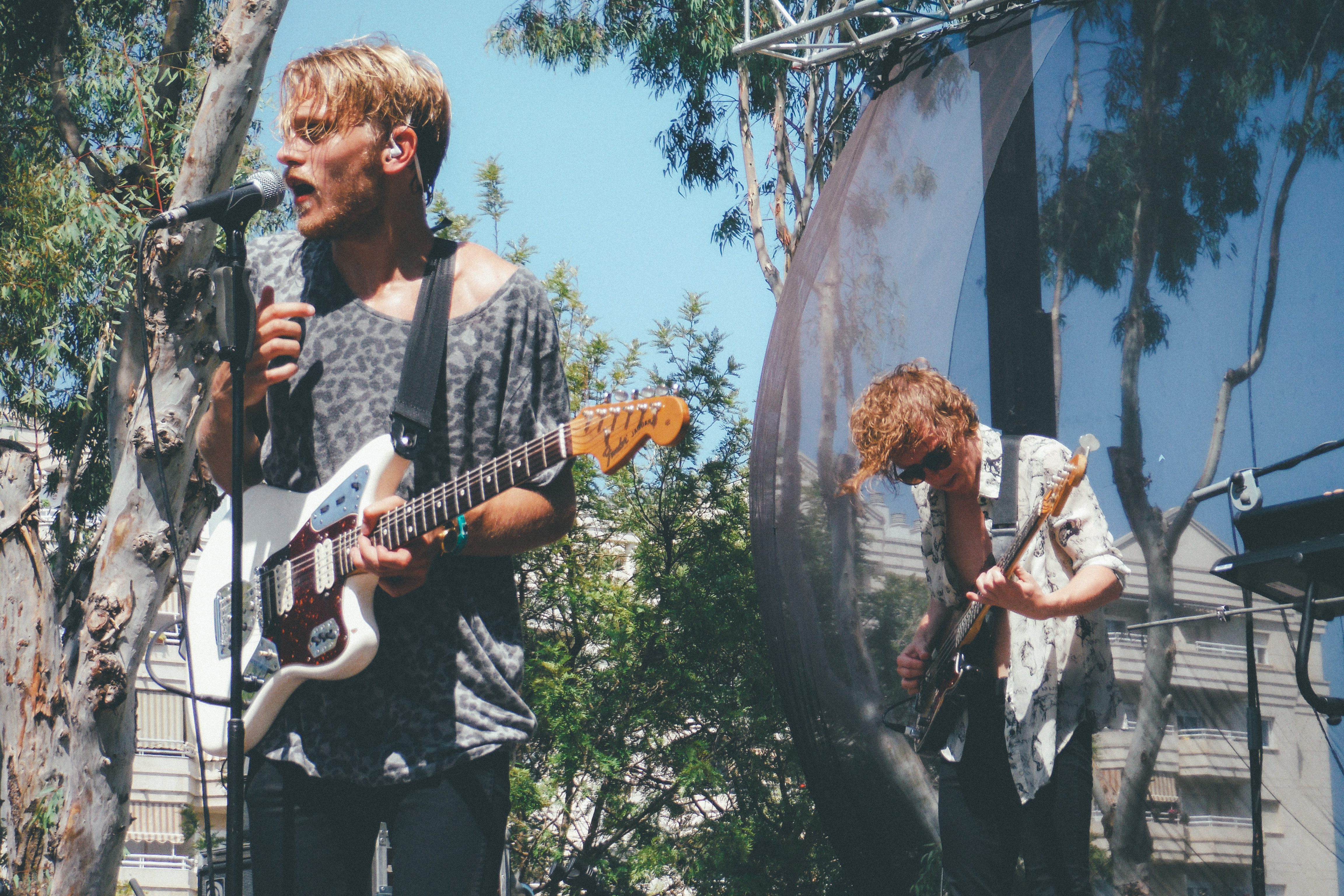 Concierto de The Royal Concept en el 101 Sun Festival 2014, Málaga, España.